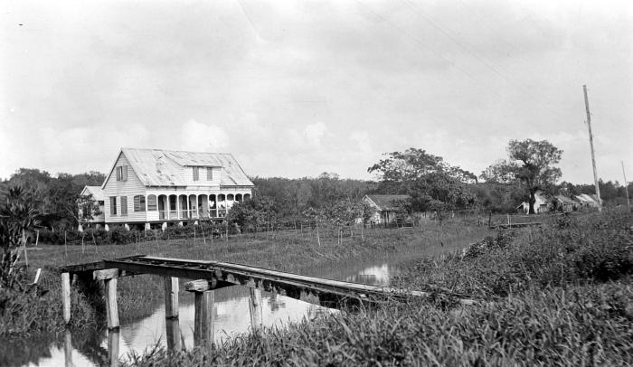 Negatief. Het ziekenhuis en arbeiders woningen op onderneming Clevia